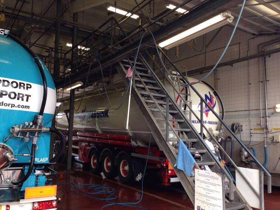 H S cleaning